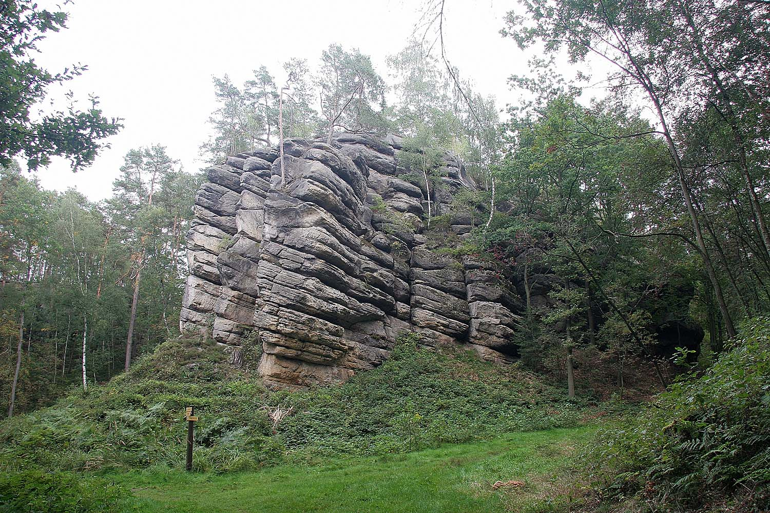 Cikánský důl u hradu Sloup v Čechách autor:Prazak date:20. 9. 2006